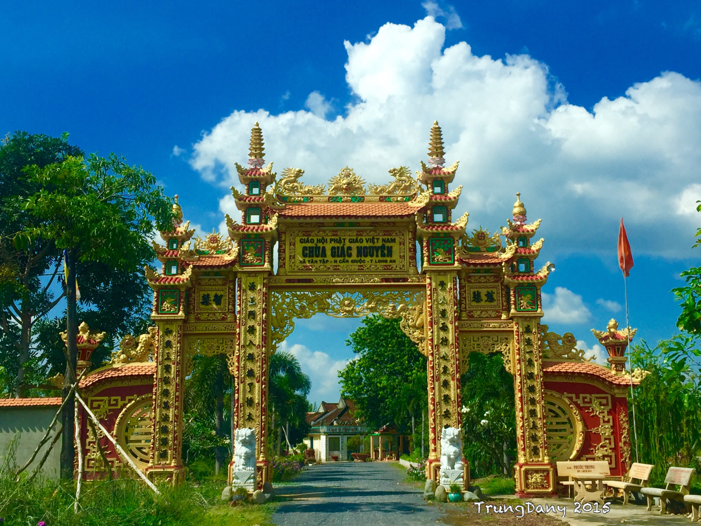 Cong Chua Giac Nguyen, Xa Tân Tập, Cần Giuộc, Long An, Việt Nam